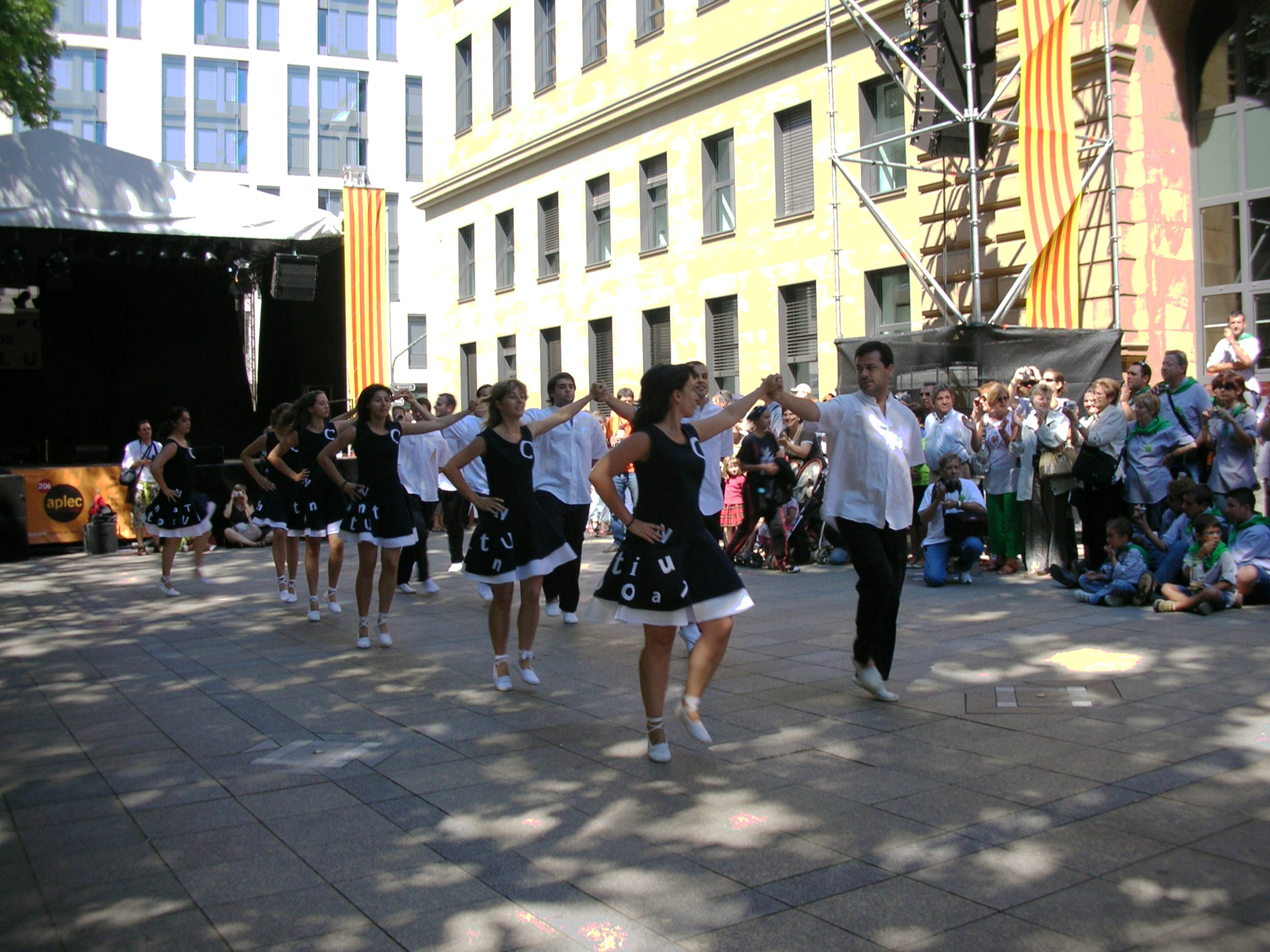 Aplec internacional de Frankfurt; Sardanes auf dem Platz vor der Frankfurter Börse; Anlass der Anreise der Tänzer war u.a. die Vorstellung des "Gastlands Katalonien" auf der Frankfurter Buchmesse 2007